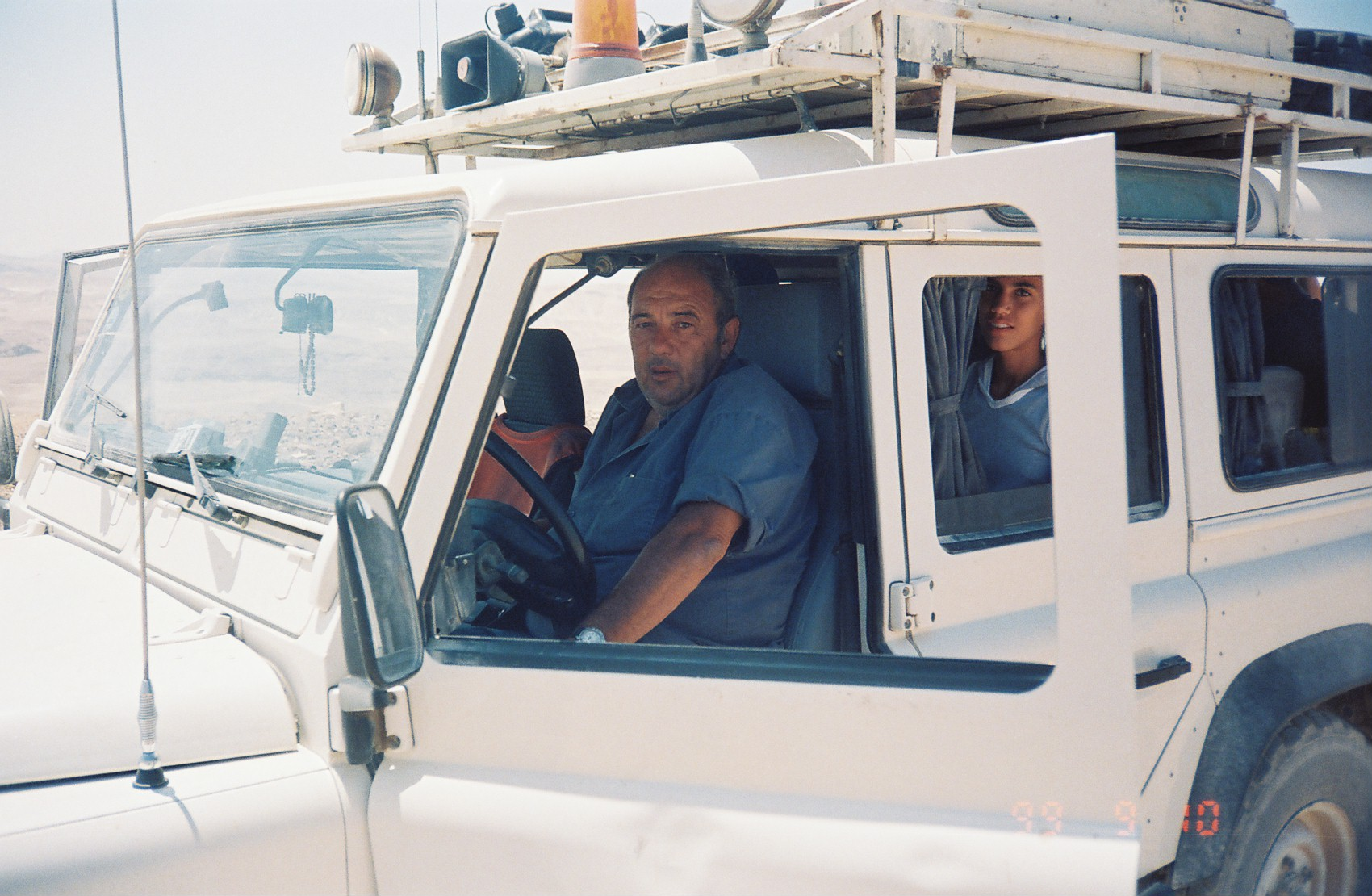 דב ויינשטוק